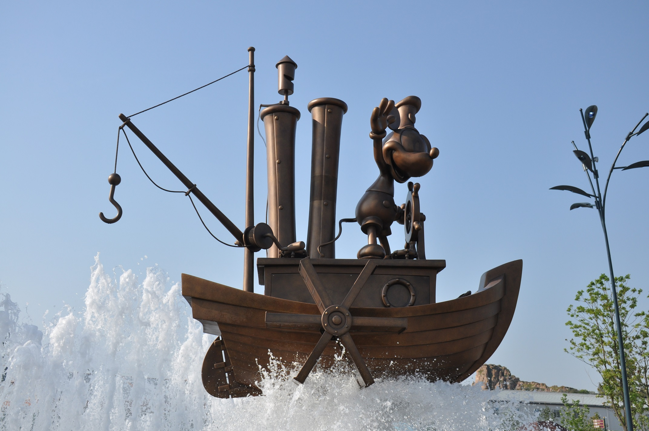 中文（中国大陆）: 上海迪士尼乐园入口处的《蒸汽船威利》米老鼠雕塑喷泉